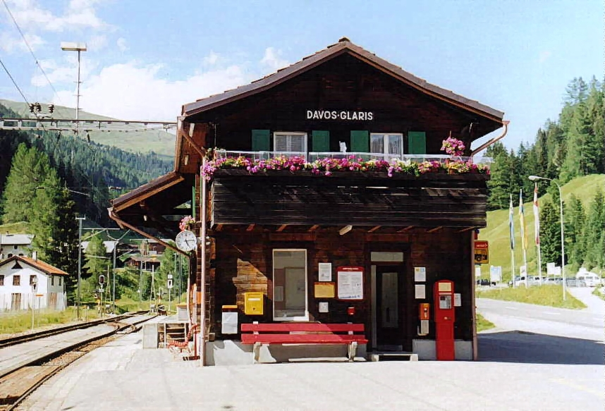 Bahnhof Davos-Glaris am Nachmittag des 21. Juni 2003. * Aufnahme: Steffen Mokosch * Lizenz: GNU FDL